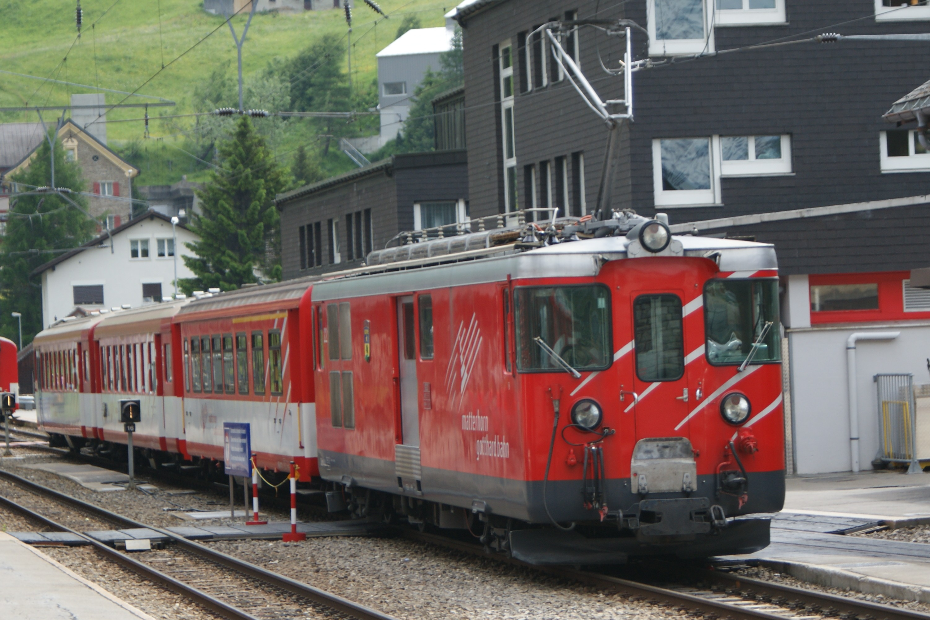 Dies war der erste Pendelzug, der aus Rollmaterial der ehemaligen FO und BVZ gemischt wurde: Deh 4/4 22 - AB 4171 - B 2290 - Bt 2254